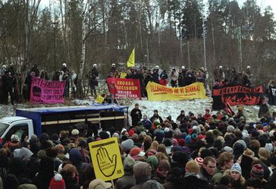 Bilden är tagen av Alfred Jungekrans och gjordes till public domain på svenska Indymedia. Bilden föreställer motdemonstrationen mot Salemmarschen på Rönninge Torg 2003.